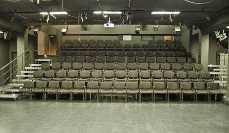 Университетски театър на НБУ